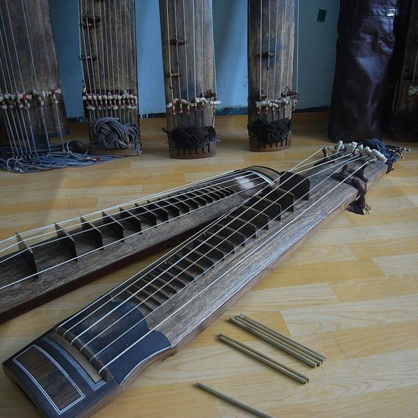 거문고 2대. 사진 하단의 황색 막대기는 '술대'이다.